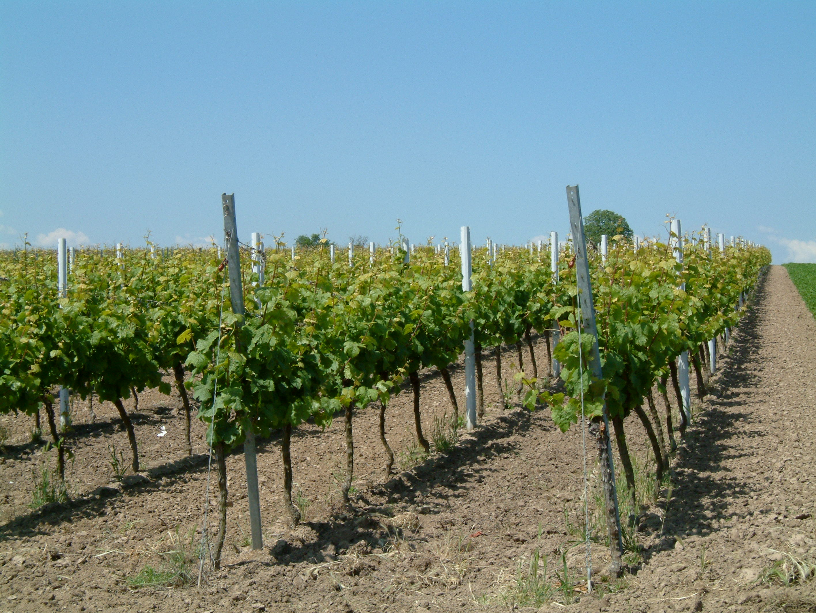 Riesling-Weinberg bei Dirmstein, selbst fotografiert am 2006-06-08 und freigegeben durch Benutzer:Mundartpoet